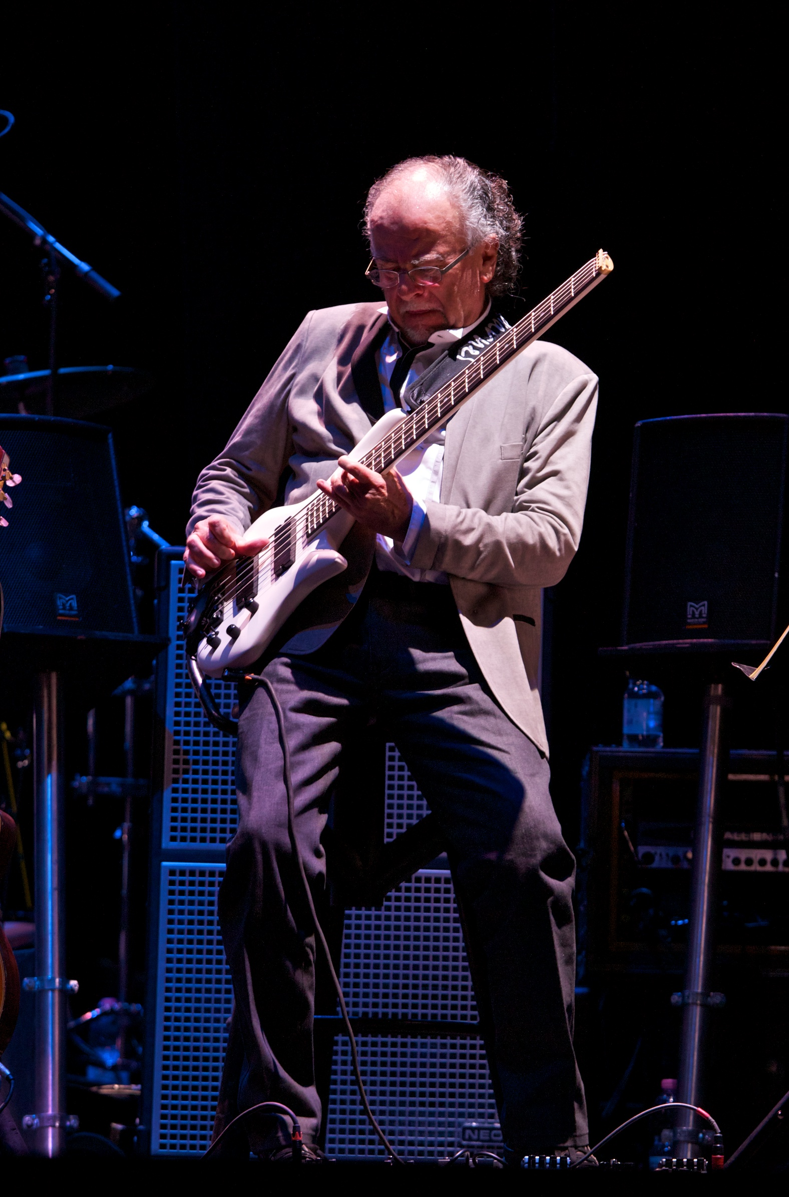 Patrick Djivas in concerto con la PFM durante PFM in Classic, al teatro Verdi a Firenze.